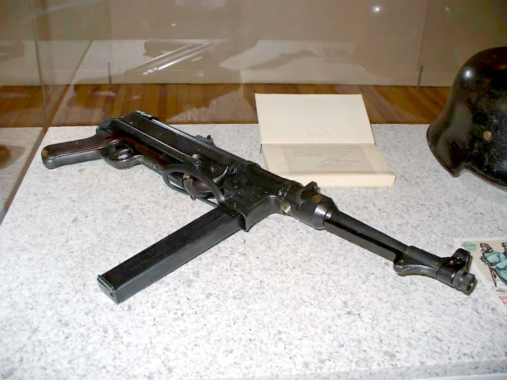 MP 40, German standard sub-machine gun during WWII